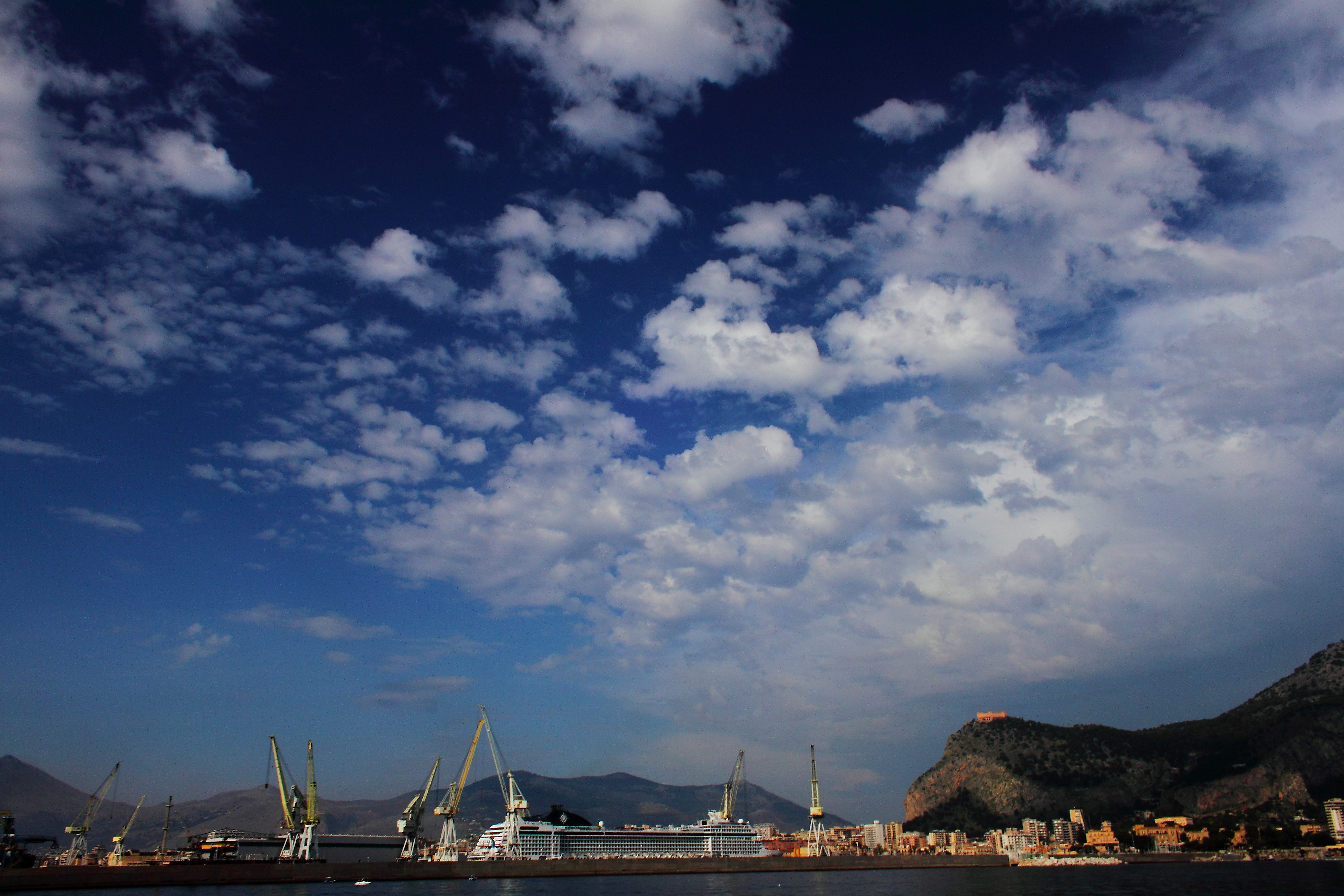 Palermo, visto dal mare, 23 e 30 ottobre 2011